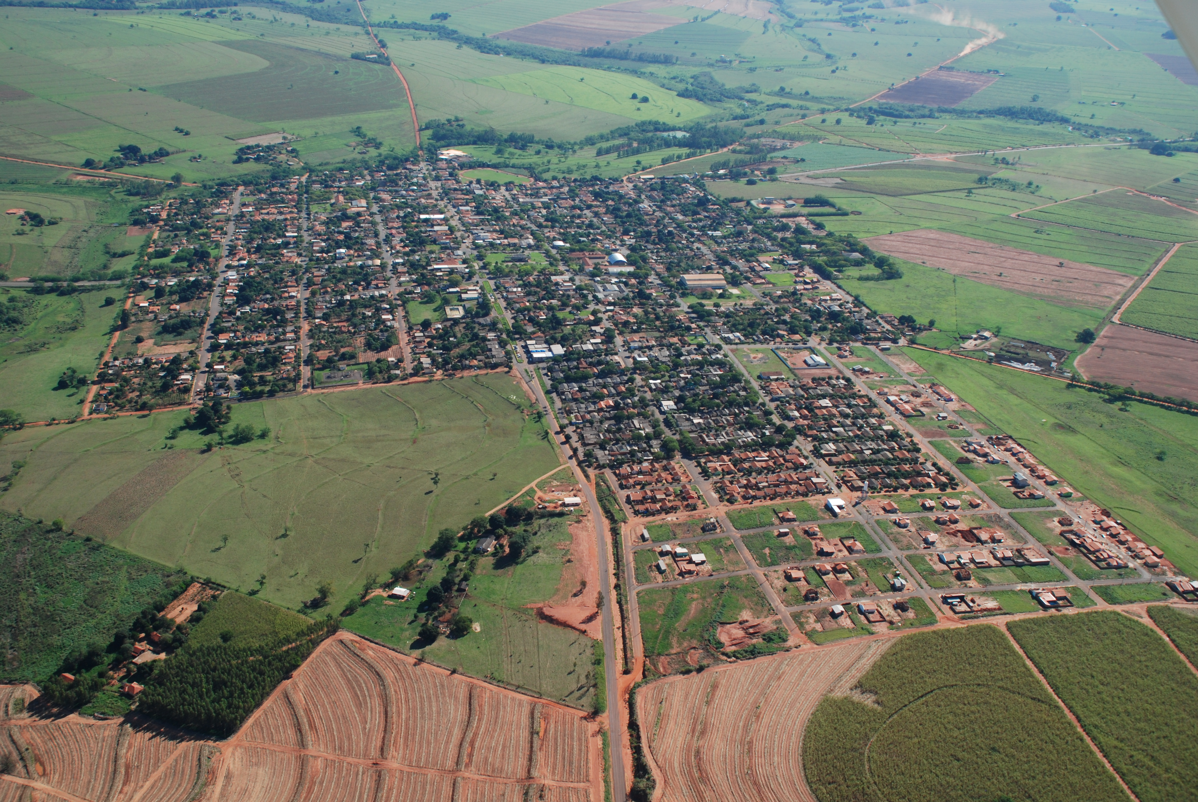 Santo Inácio - Foto Aérea 2010